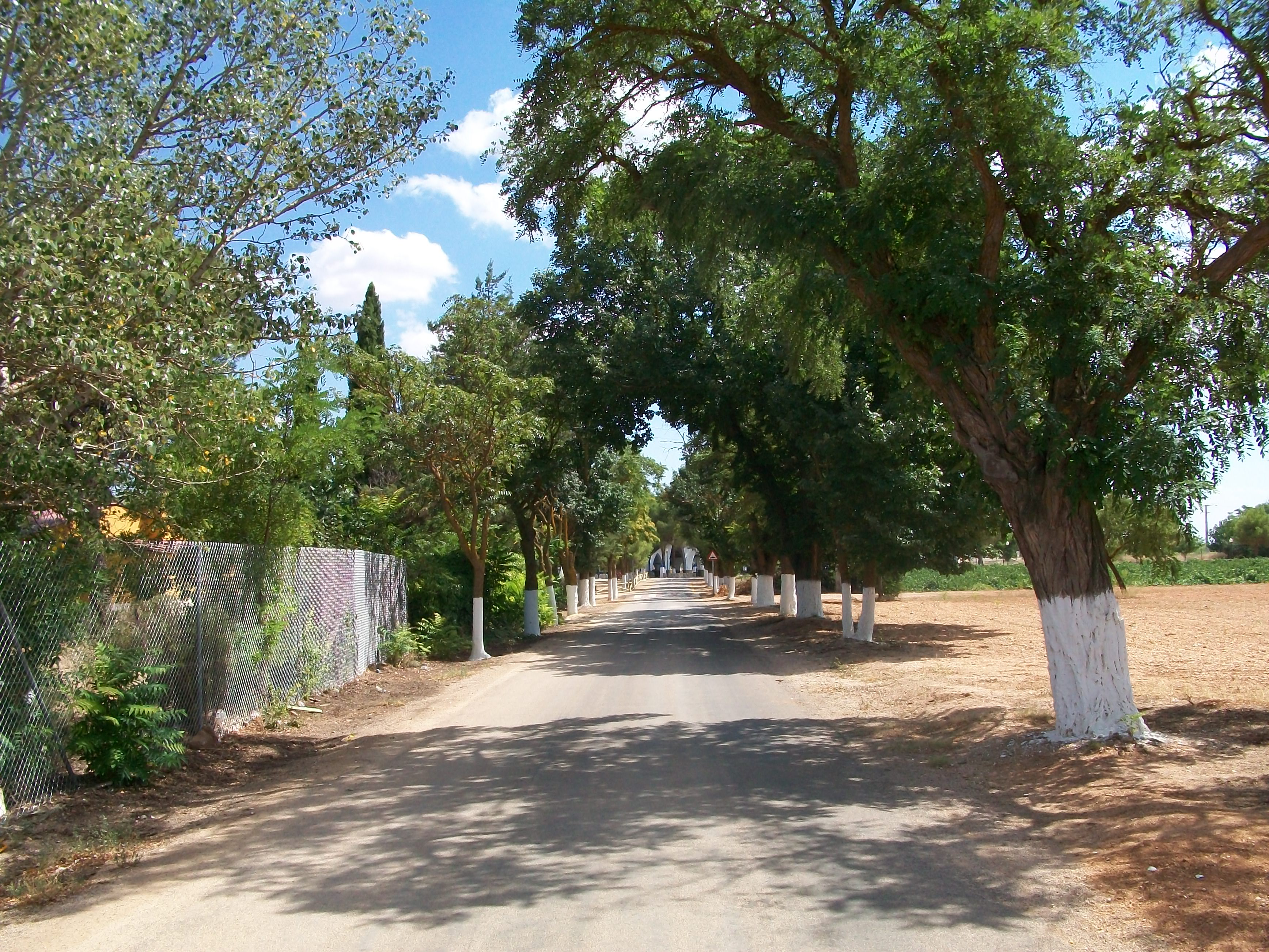 Camino de San Miguel en Pedro Muñoz.